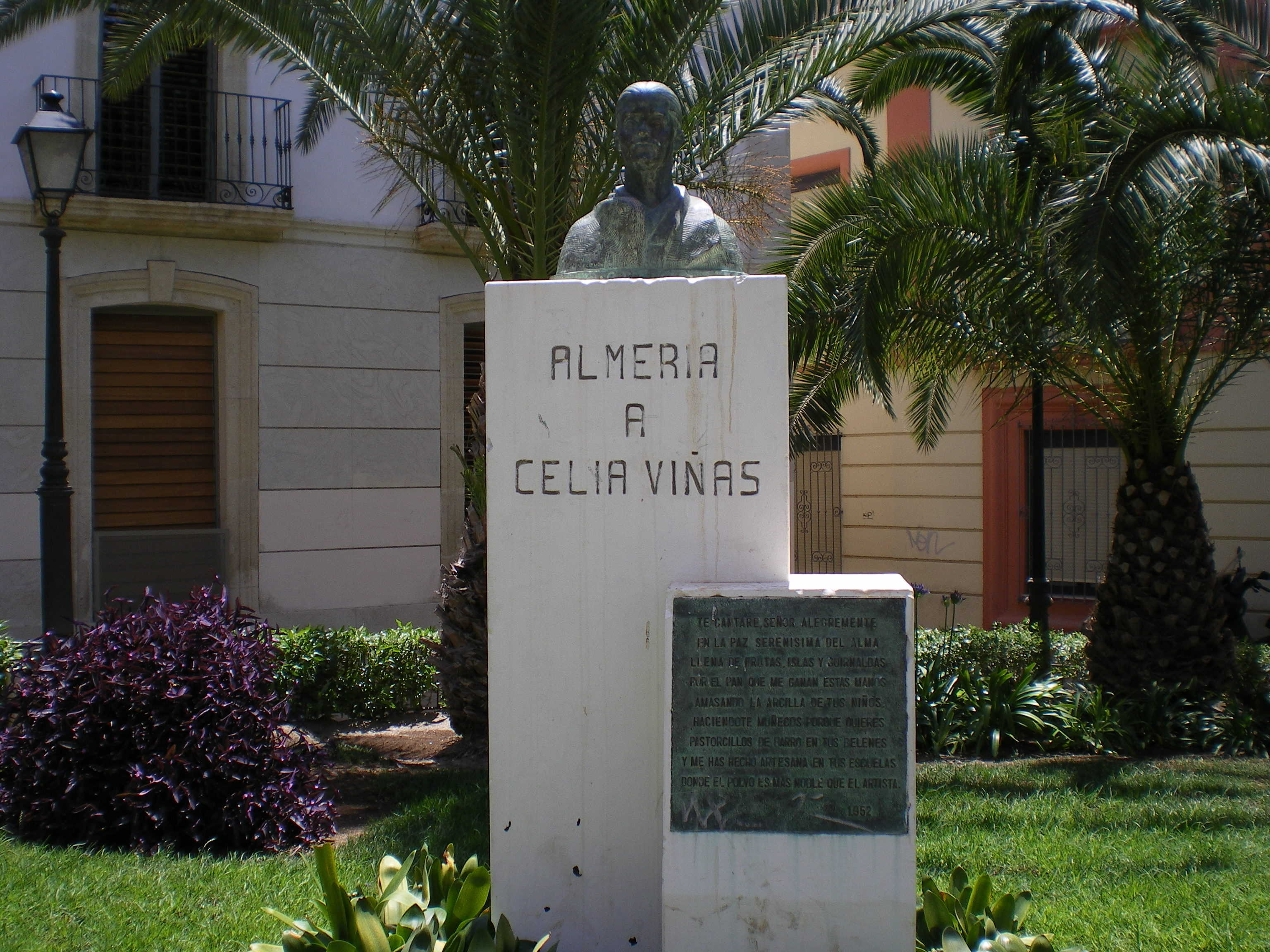 Fotografía del busto dedicado a Celia Viñas Olivella, educadora y poetisa nacida en Lérida y fallecida en Almería, situado en la Plaza Bendicho de Almería, Andalucía, España.